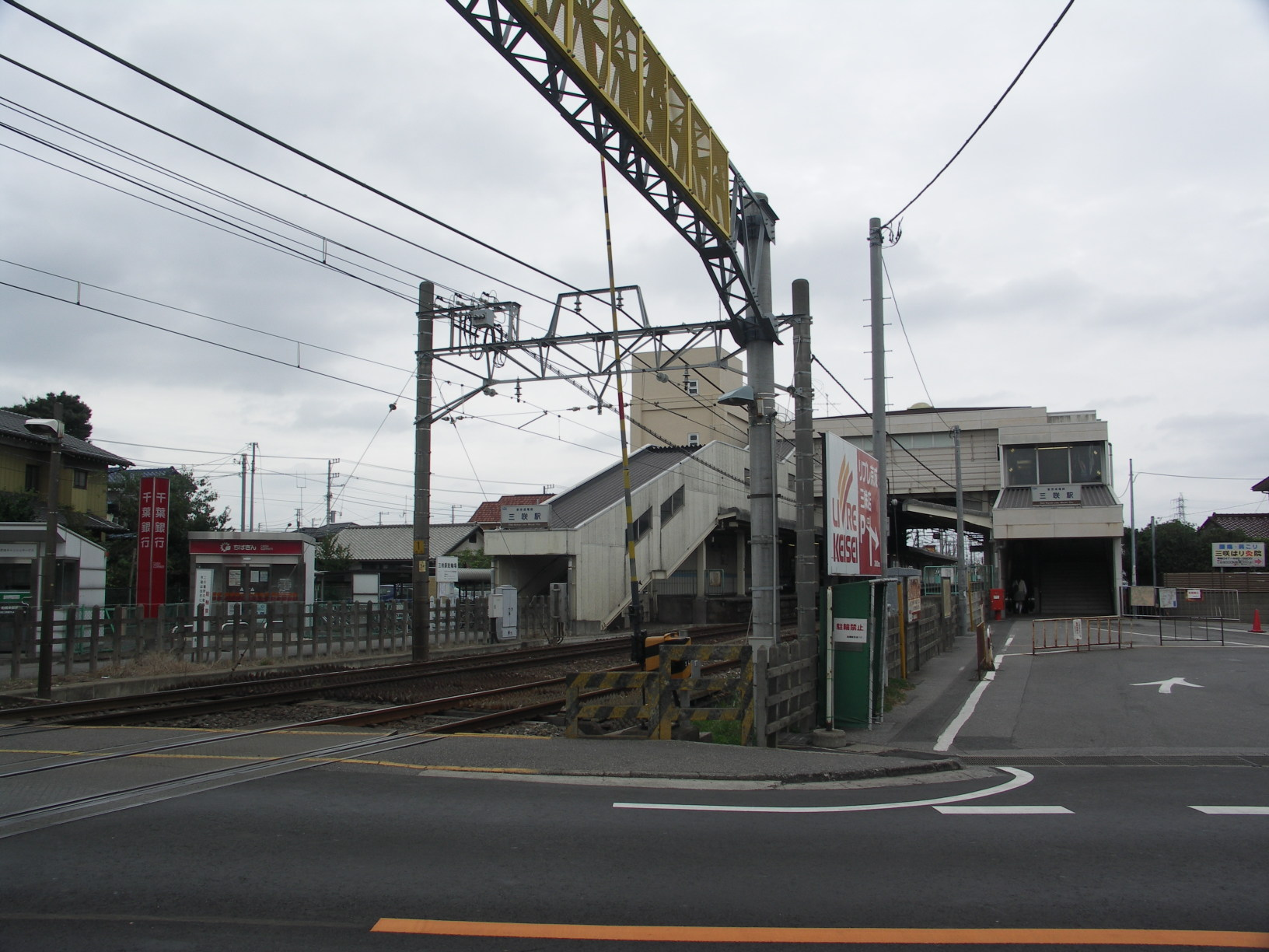 Misaki station, Shin-Keisei Line, Chiba, Japan, 三咲駅